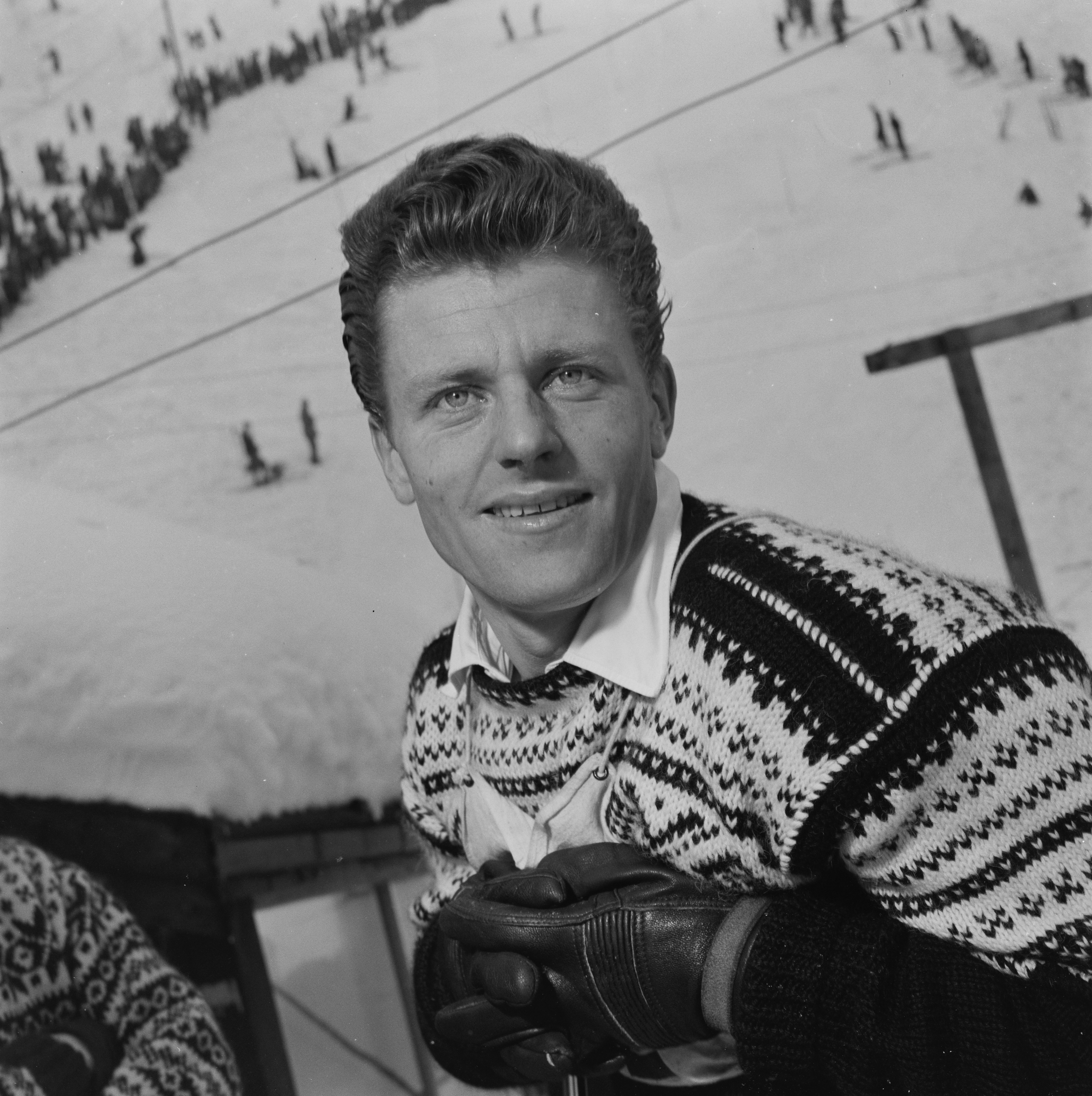 Bildet er hentet fra Arkivverket. Stein Eriksen, skiløper. NÅ nr. 8, 1954 Arkivinstitusjon : Riksarkivet Arkivnavn : Billedbladet NÅ Sted : Norge, Ukjent, Ukjent, Ukjent Avbildet: Eriksen, Stein